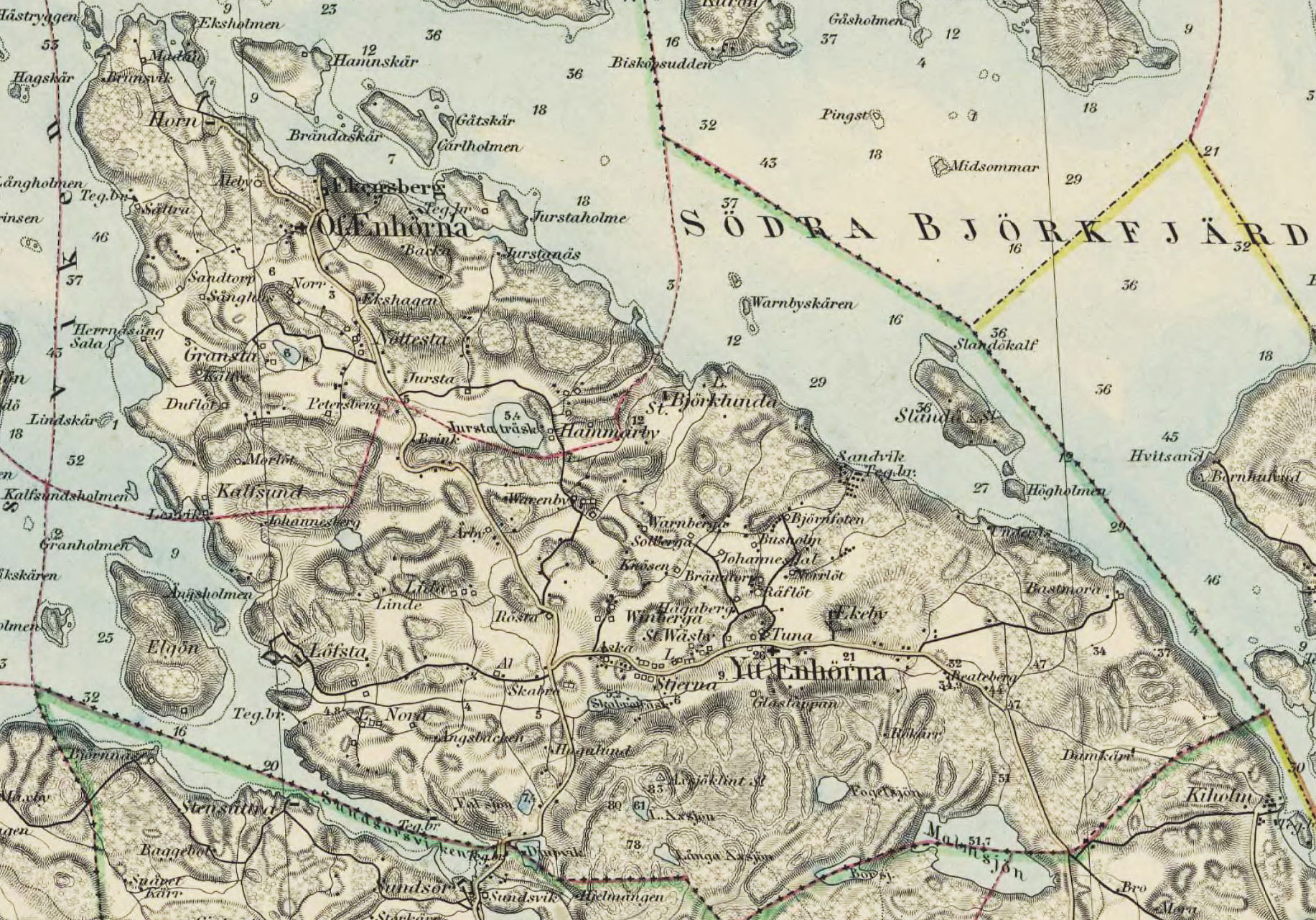 Enhörnahalvön på Generalstabskartan